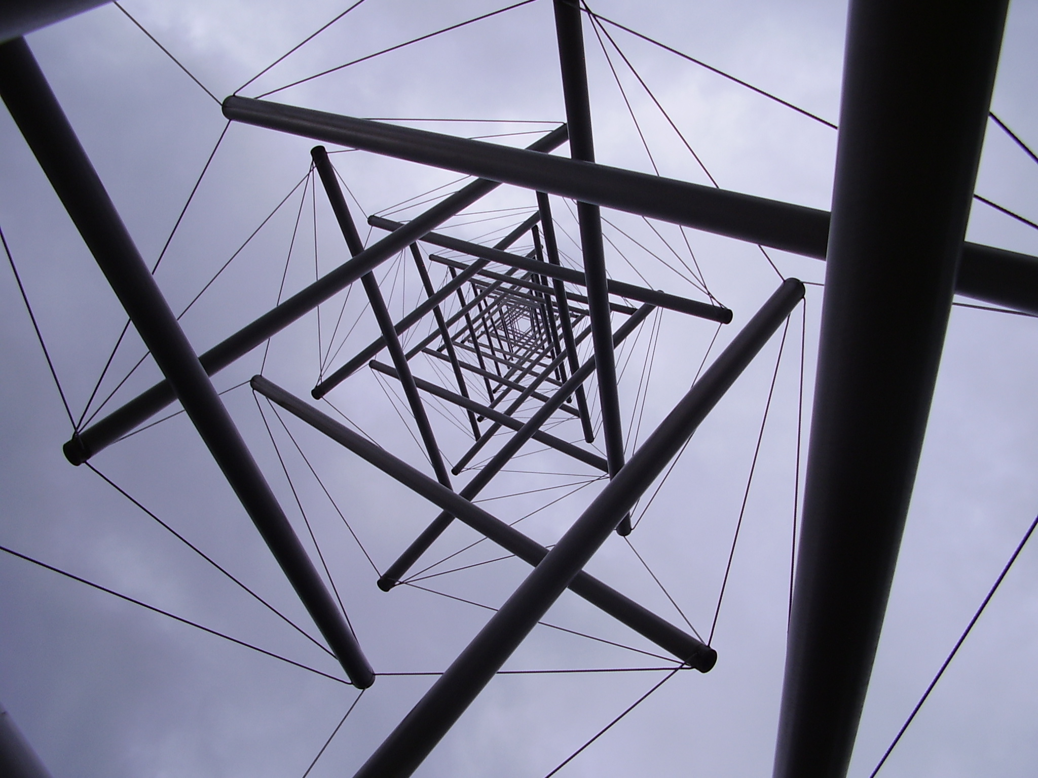 Needle Tower II van Kenneth Snelson in de beeldentuin van het Kröller-Müller Museum in het Nationaal Park De Hoge Veluwe. Gemaakt in 1969 van aluminum en roestvrij staal. 90 x 18 x 18 feet, 30 x 6 x 6m. The Netherlands.